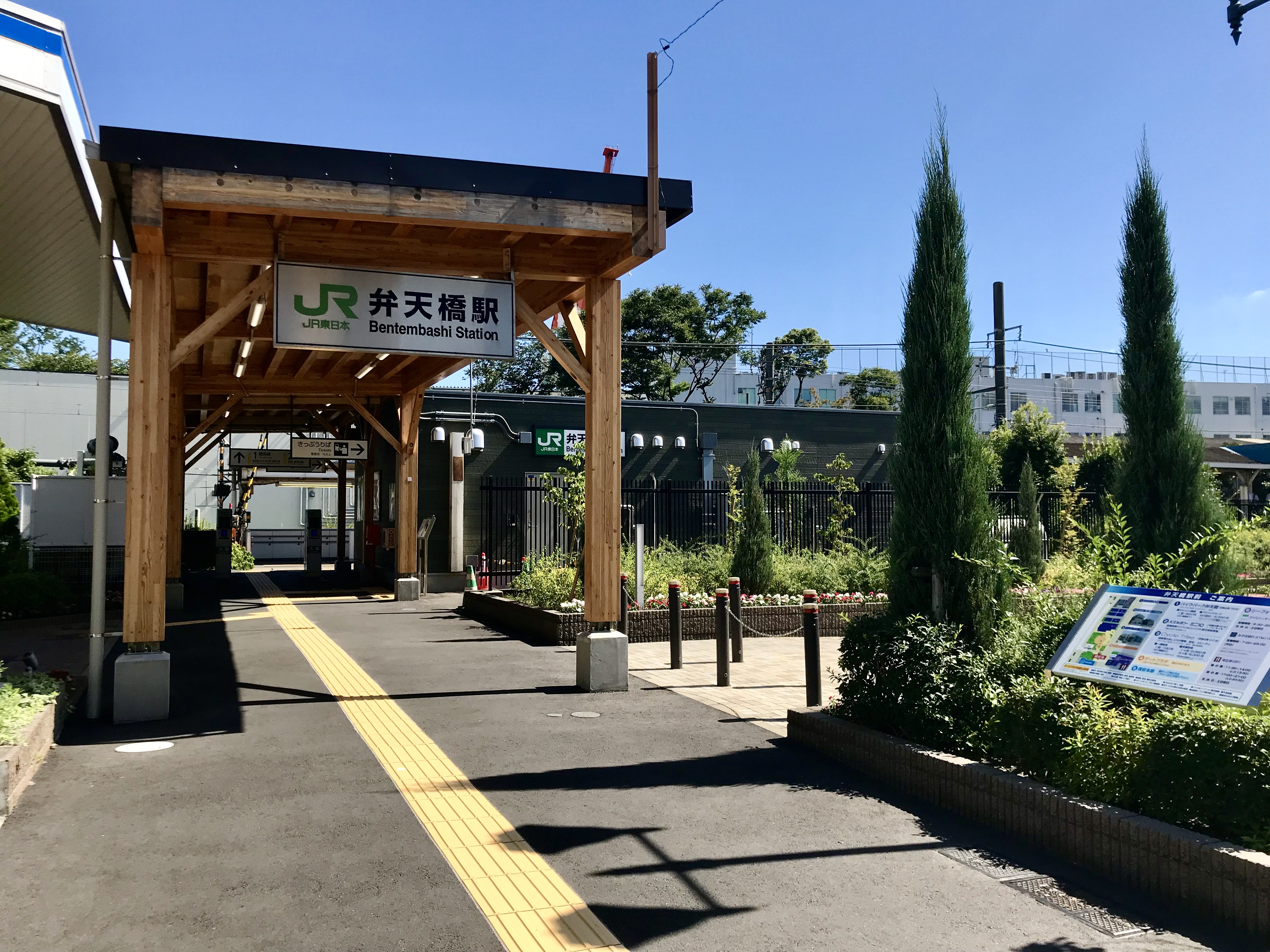 JR東日本鶴見線弁天橋駅駅舎